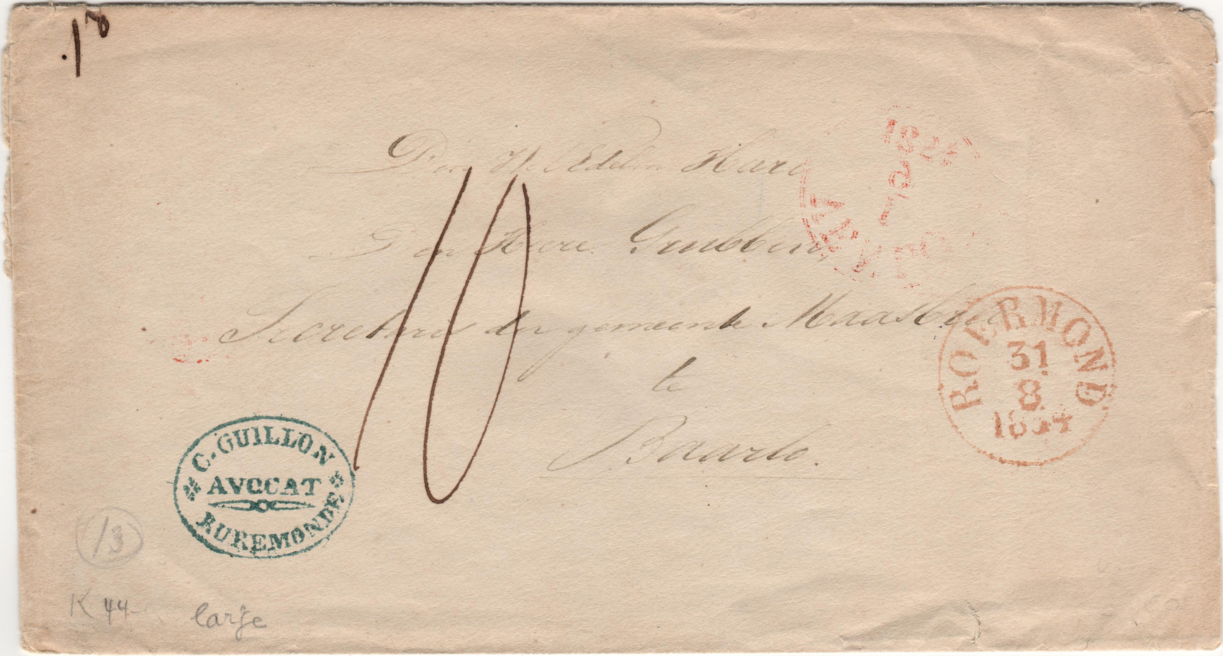 Envelop gericht aan dhr. Grubben, secretaris van de gemeente Maasbree, wonend in Baarlo. Op de voorzijde het stempel van de Roermondse advocaat Guillon. De brief zelf ontbreekt. Op de voorzijde verder poststempel Roermond, 31 augustus 1854. Op de achterzijde poststempel Venlo, 1 september 1854. Portokosten 10 [cent].